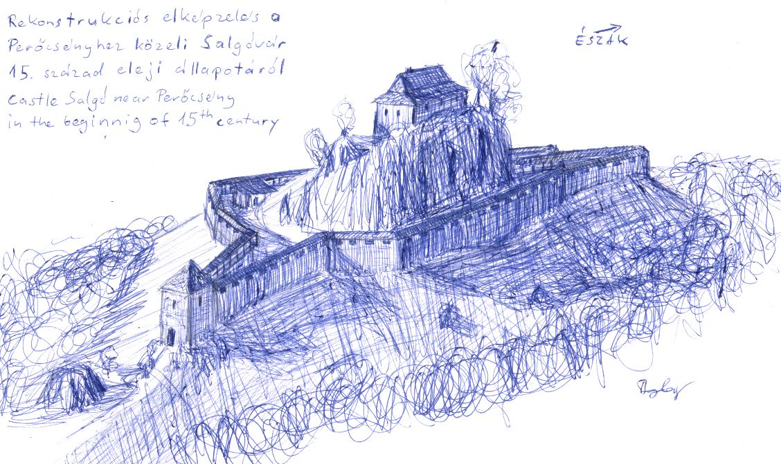 A Perőcsényhez közeli Salgóvár rekonstrukciós rajza a 15. század eleji elképzelt állapotnak megfelelően.